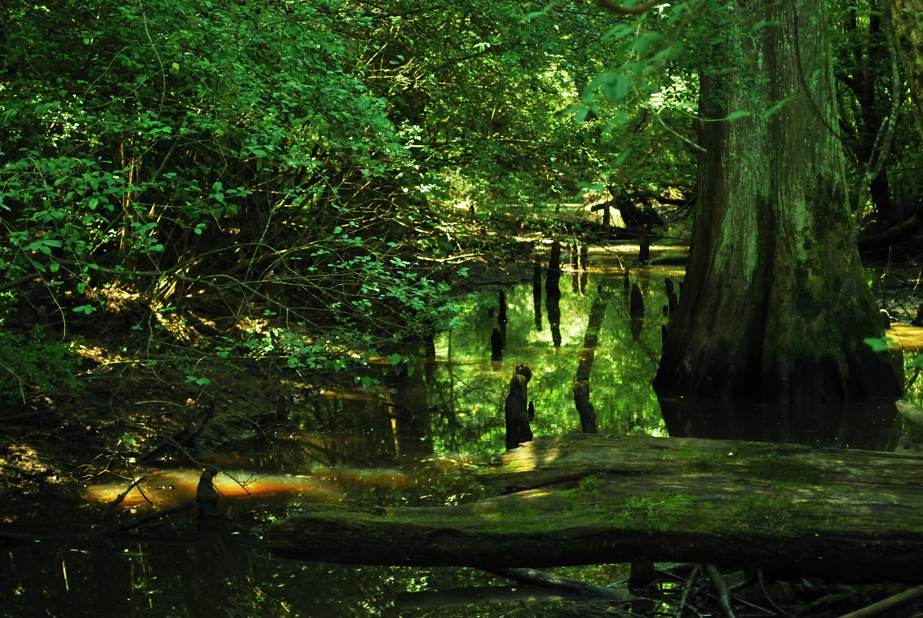 Yockanookany